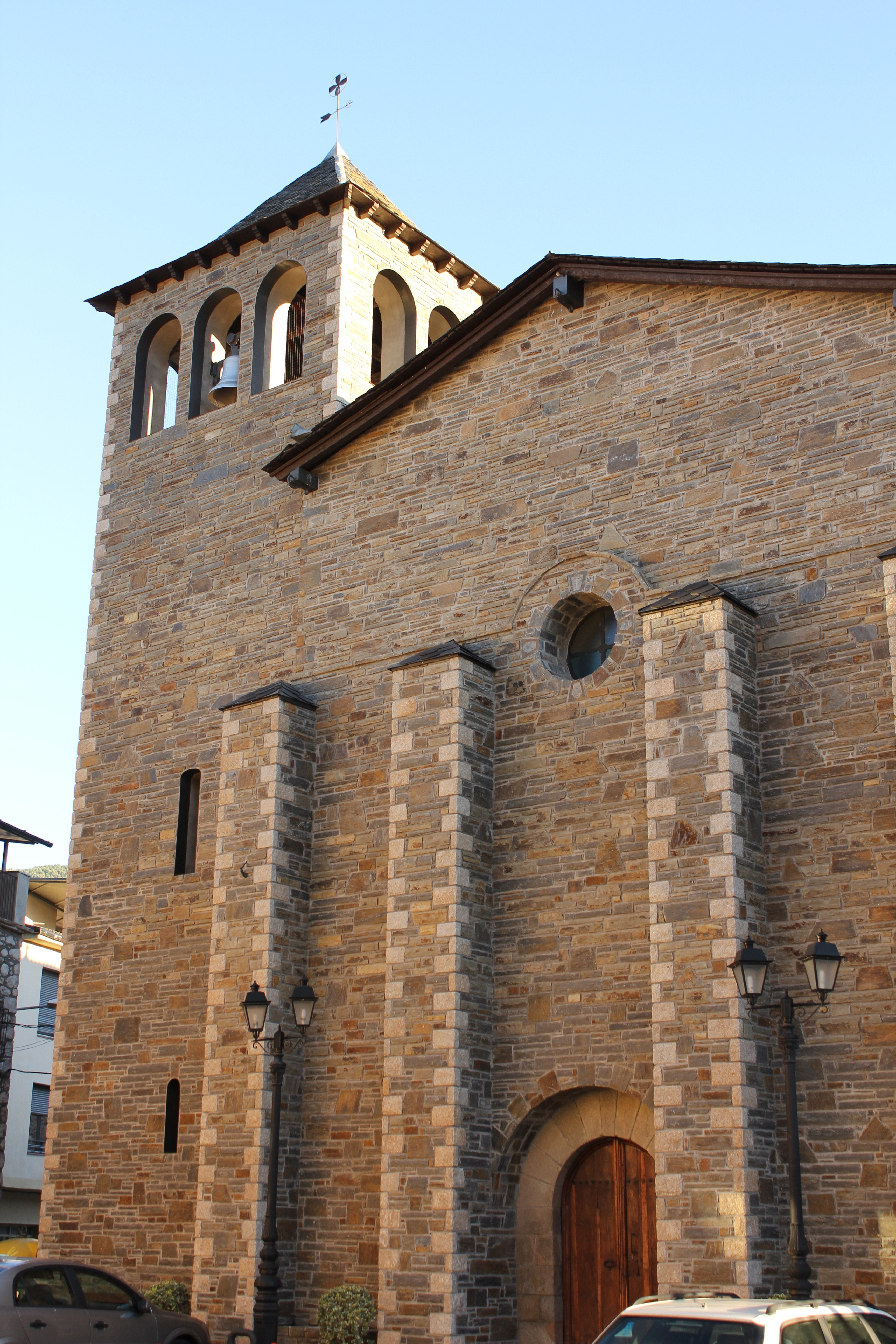 Església parroquial de la Puríssima (Ribera d'Urgellet)